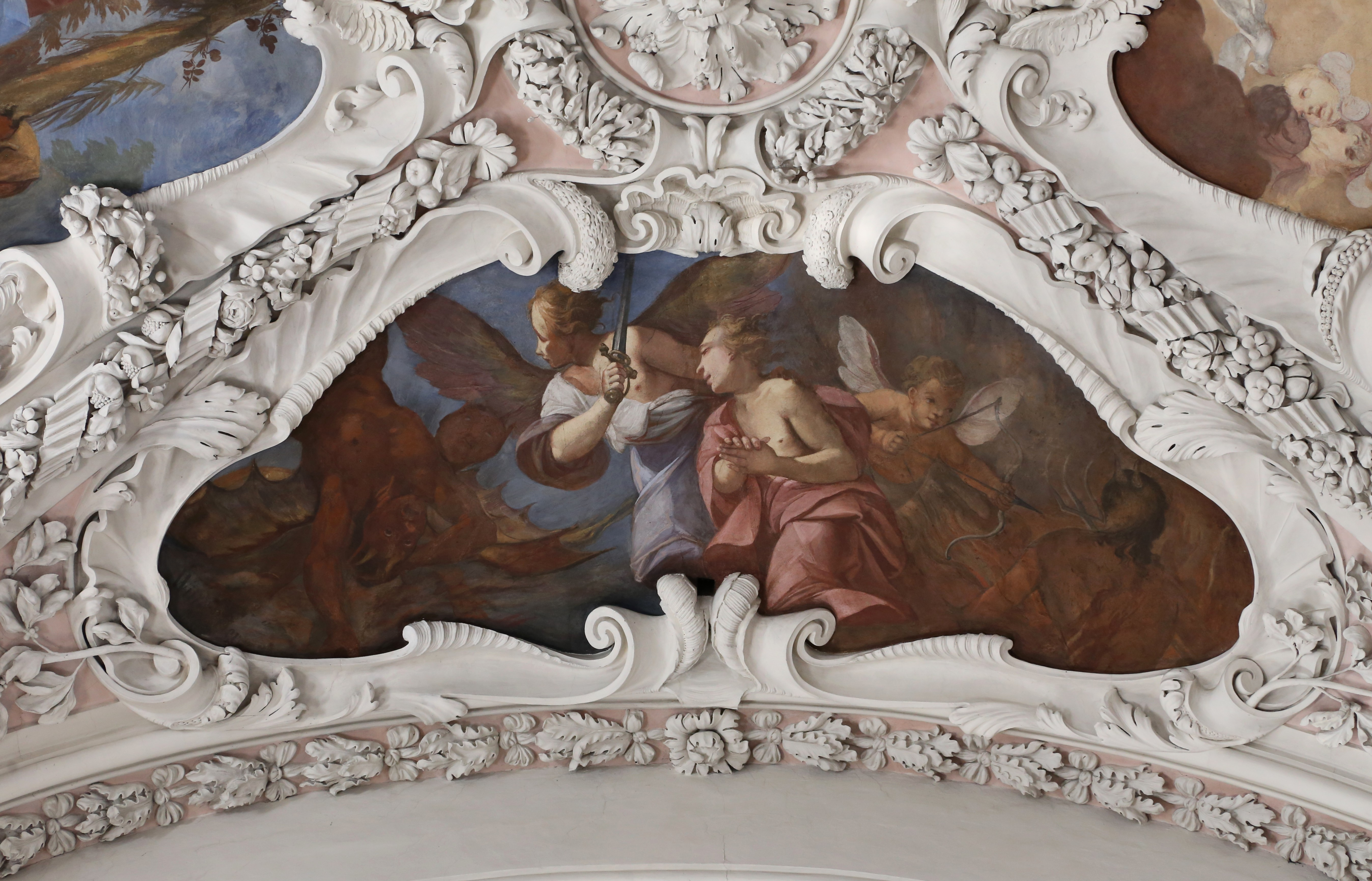 Gartlberg, Pfarrkirchen; Katholische Wallfahrtskirche, Barockbau mit Doppelturmfassade und Hl. Grab-Kapelle im Osten des Chores, 1669–1688 nach Plänen von Domenico Zuccalli erbaut, Fertigstellung um 1715 u. a. durch Giovanni Battista Carlone und Paolo Allio; mit Ausstattung